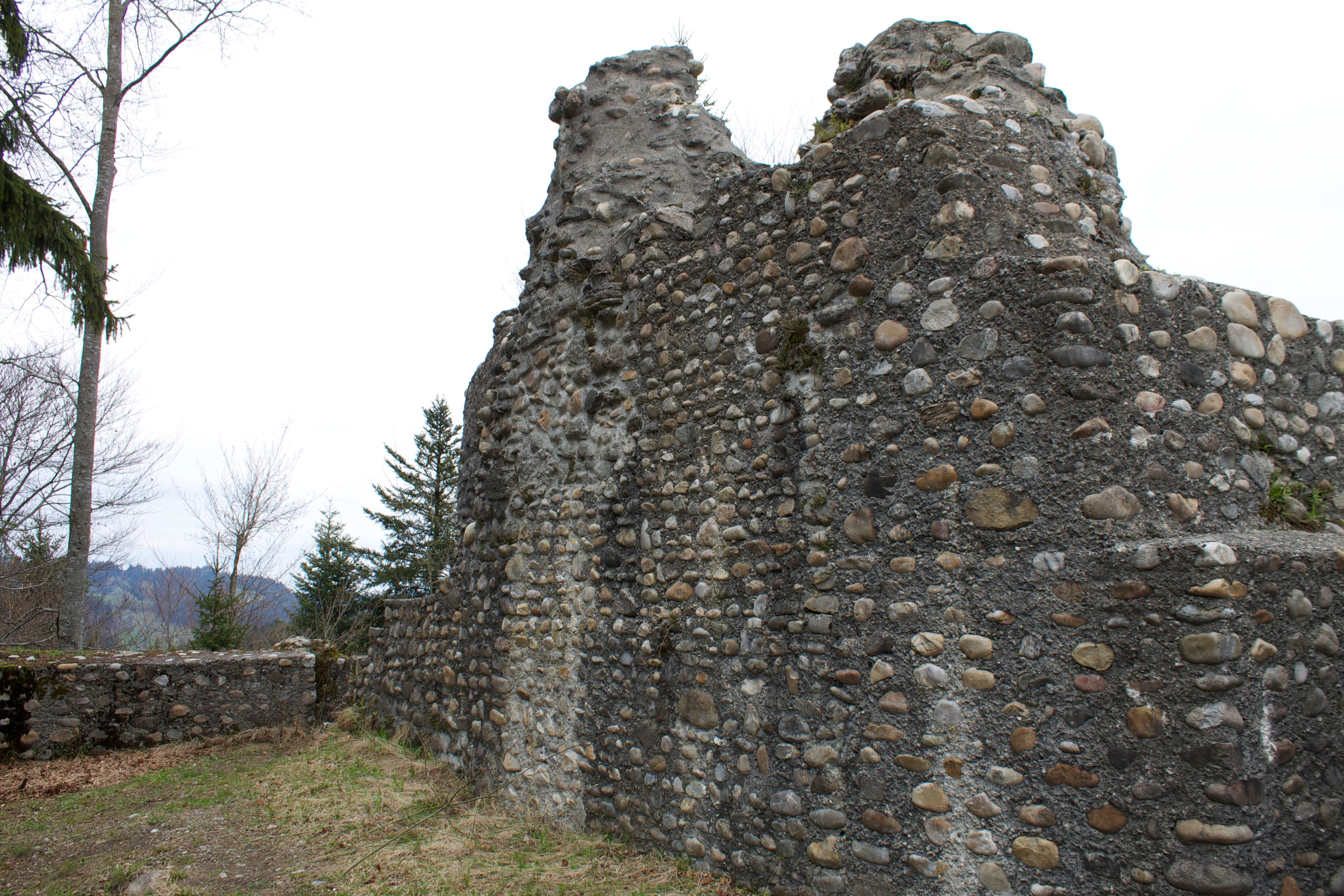 Ein Teil der Ruine Alt-Signau mit Umgebung